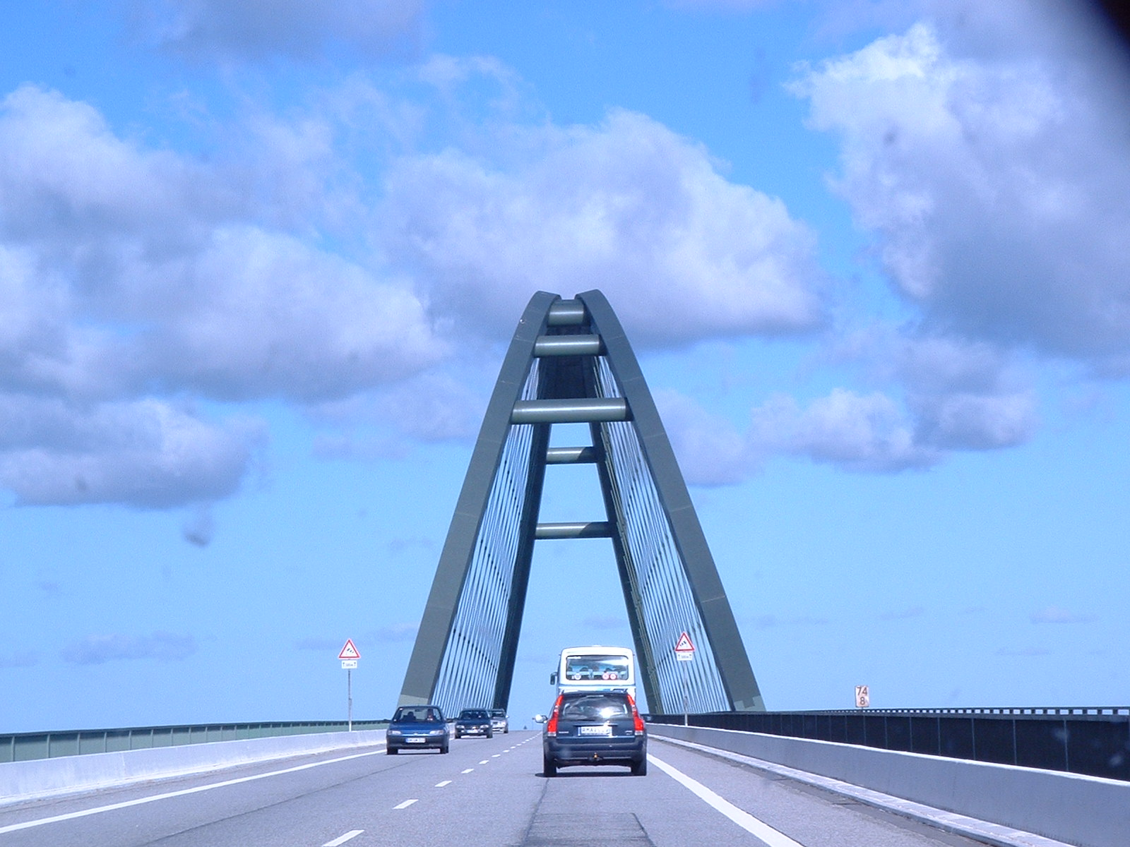 Fehmarnsundbrücke aus der Durchfahrtsansicht